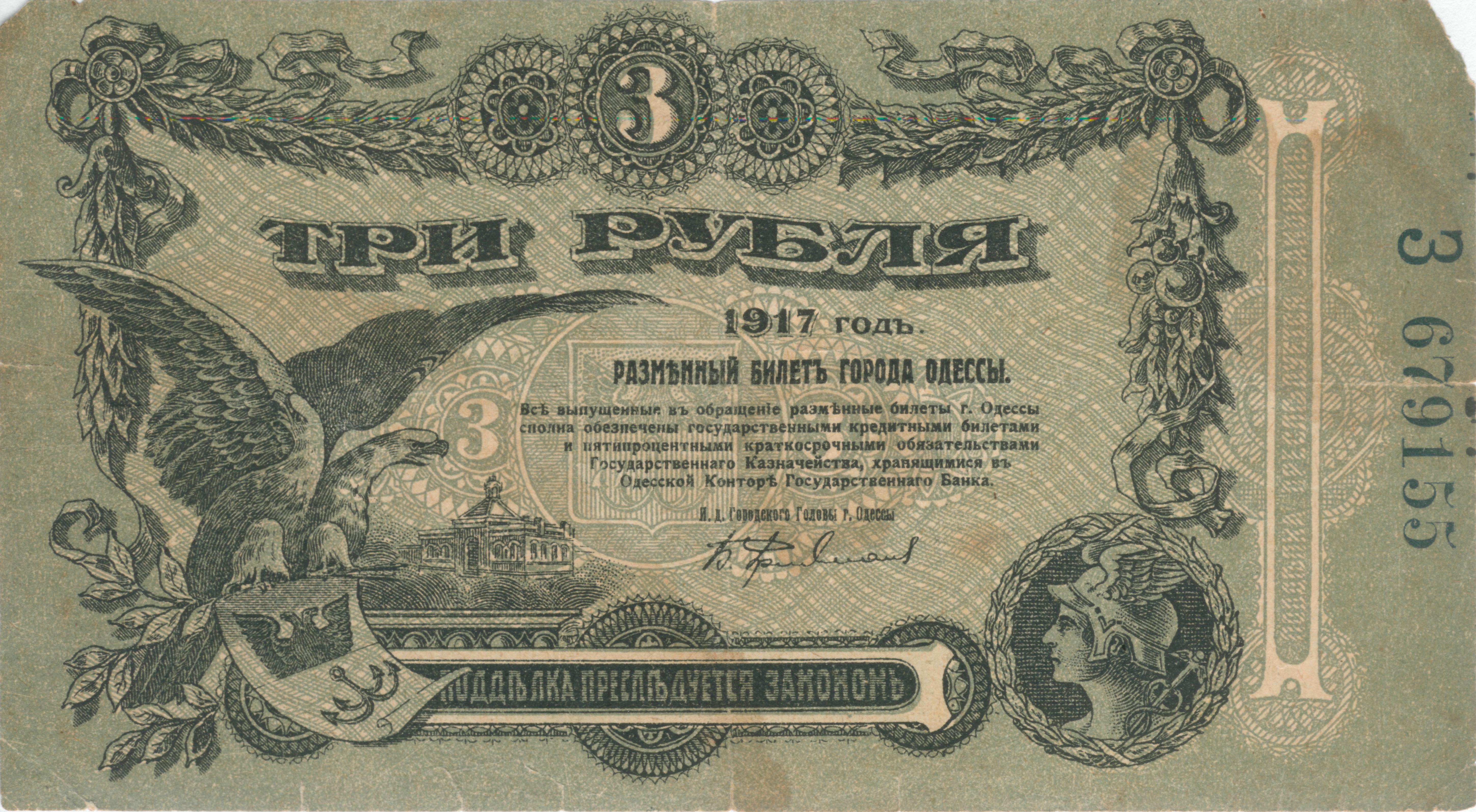 Одесские деньги - 3 рубля, аверс. 1917